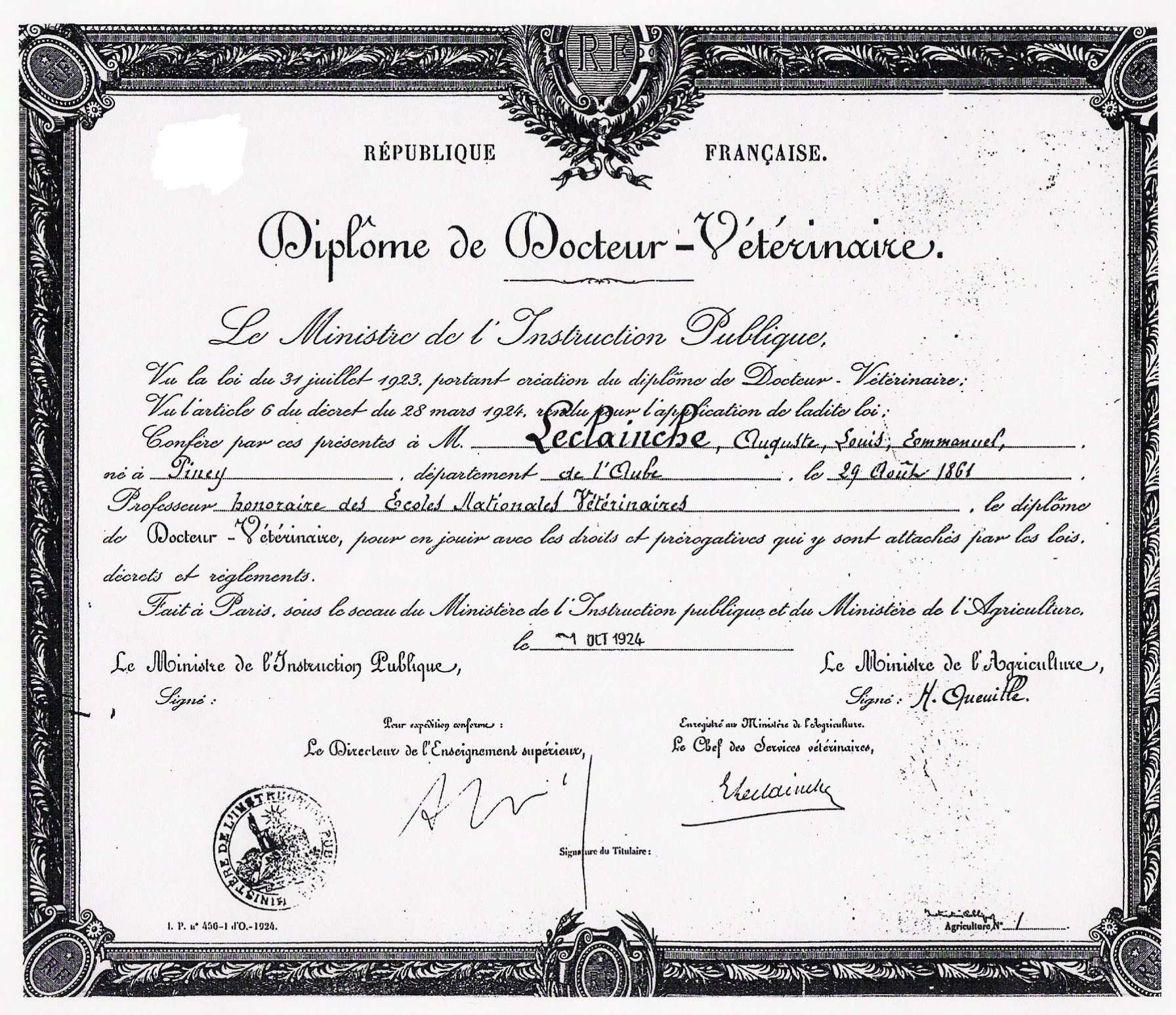 Premier diplôme de doctorat vétérinaire remis solennellement à Emmanuel Leclainche, inspecteur général des écoles vétérinaires, chef des services vétérinaires du ministère de l'agriculture, après la promulgation de la loi sur le doctorat de médecine vétérinaire en 1923. On notera en particulier la signature, appliquée pour être bien lisible, d'Henri Queuille, ministre de l'Agriculture, et celle d'Emmanuel Leclainche en tant que chef des services vétérinaires du ministère de l'Agriculture. Le banquet du Syndicat national vétérinaire du 7 décembre 1923, appelé aussi banquet du doctorat, se tint en présence de Chéron, alors ministre de l'agriculture, qui fut un excellent défenseur de cette loi et su y introduire la protection du titre de vétérinaire que demandait Leclainche.